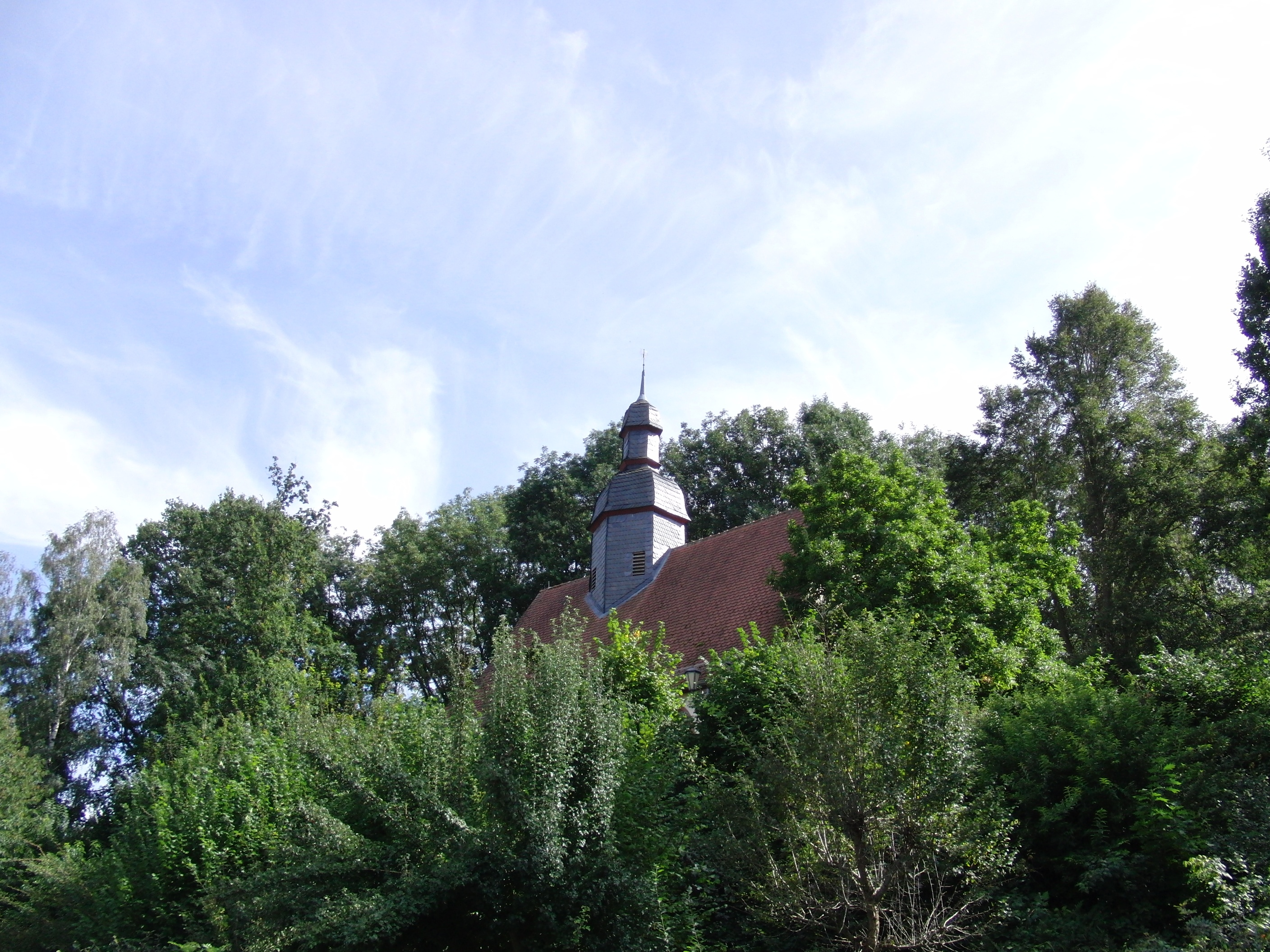 Kirche in Ascherode, Schwalmstadt(Hessen)